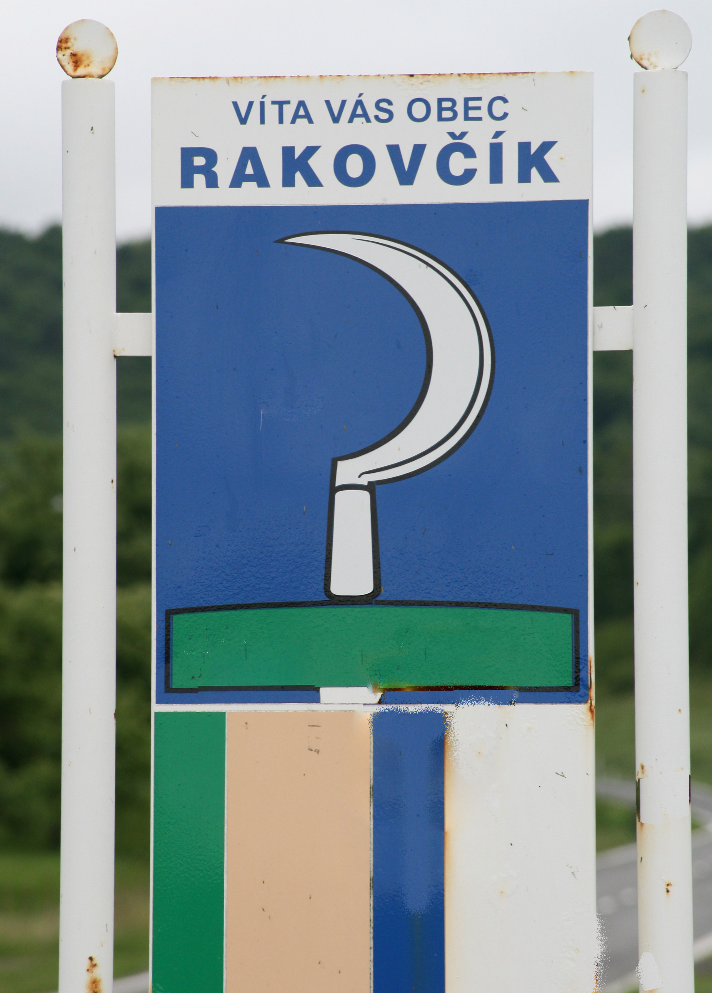 Informačná tabuľa s erbom obce Rakovčík